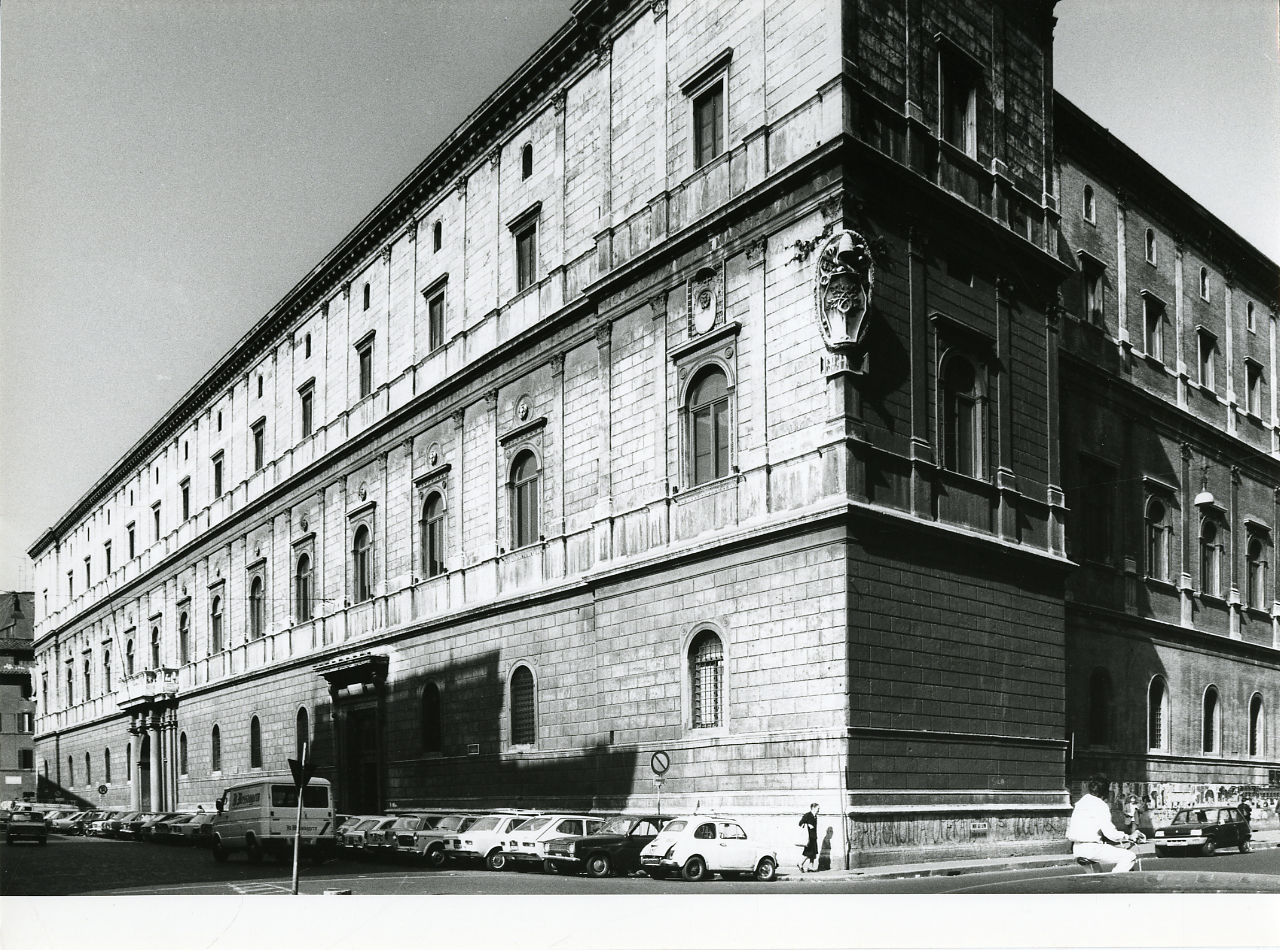 Servizio fotografico : Roma, 1979 / Paolo Monti. - Stampe: 7 : Positivo b/n, gelatina bromuro d'argento/ carta, 24x30. - ((Al verso delle stampe manoscritto numero di negativo corrispondente: 3294/22, 3294/24, 3294/27, 3294/29, 3296/12, 3296/14, 3296/21 Sul coperchio della scatola manoscritto a pennarello nero: "Roma". - Occasione: Documentazione per la ubblicazione: " Fumagalli, Alberto "Mirabilia Romae: il centro storico nell'arte attraverso i secoli", Milano Cariplo 1979. - Fonte: Agenda di Paolo Monti: Nikon Leika 3001-/ Monti 1978 (1978-1982), presso Archivio Paolo Monti. - Fonte: Fattura di Paolo Monti: IV. Commesse/ Fattura n. 17/ Fotografie centro storico di Roma per Cariplo (1979/06/11), presso Archivio Paolo Monti. - Fonte: Monografia di Fumagalli, Alberto: Mirabilia Romae: il centro storico nell'arte attraverso i secoli, Milano, Cariplo (1979)